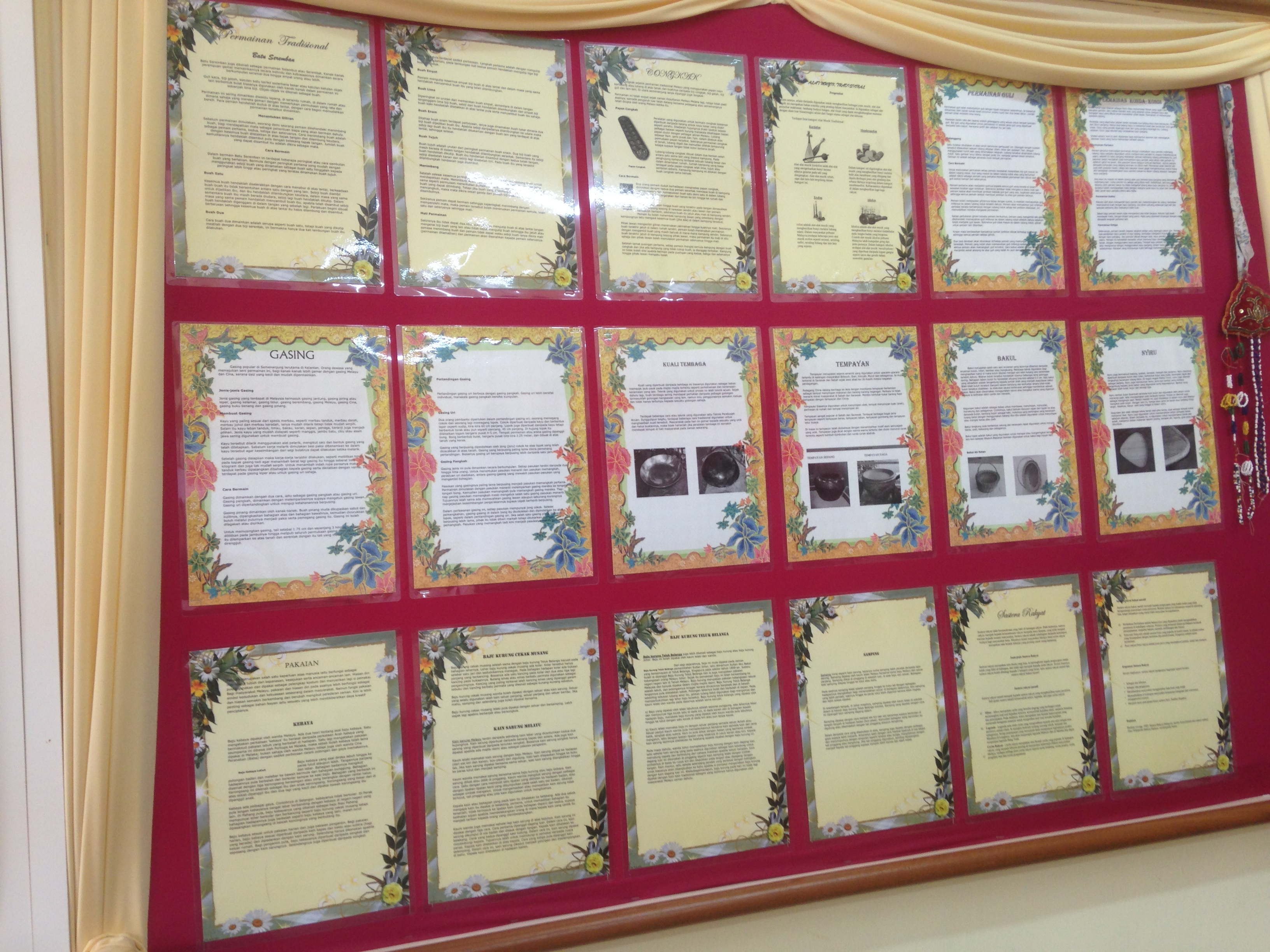 SUDUT INFORMASI